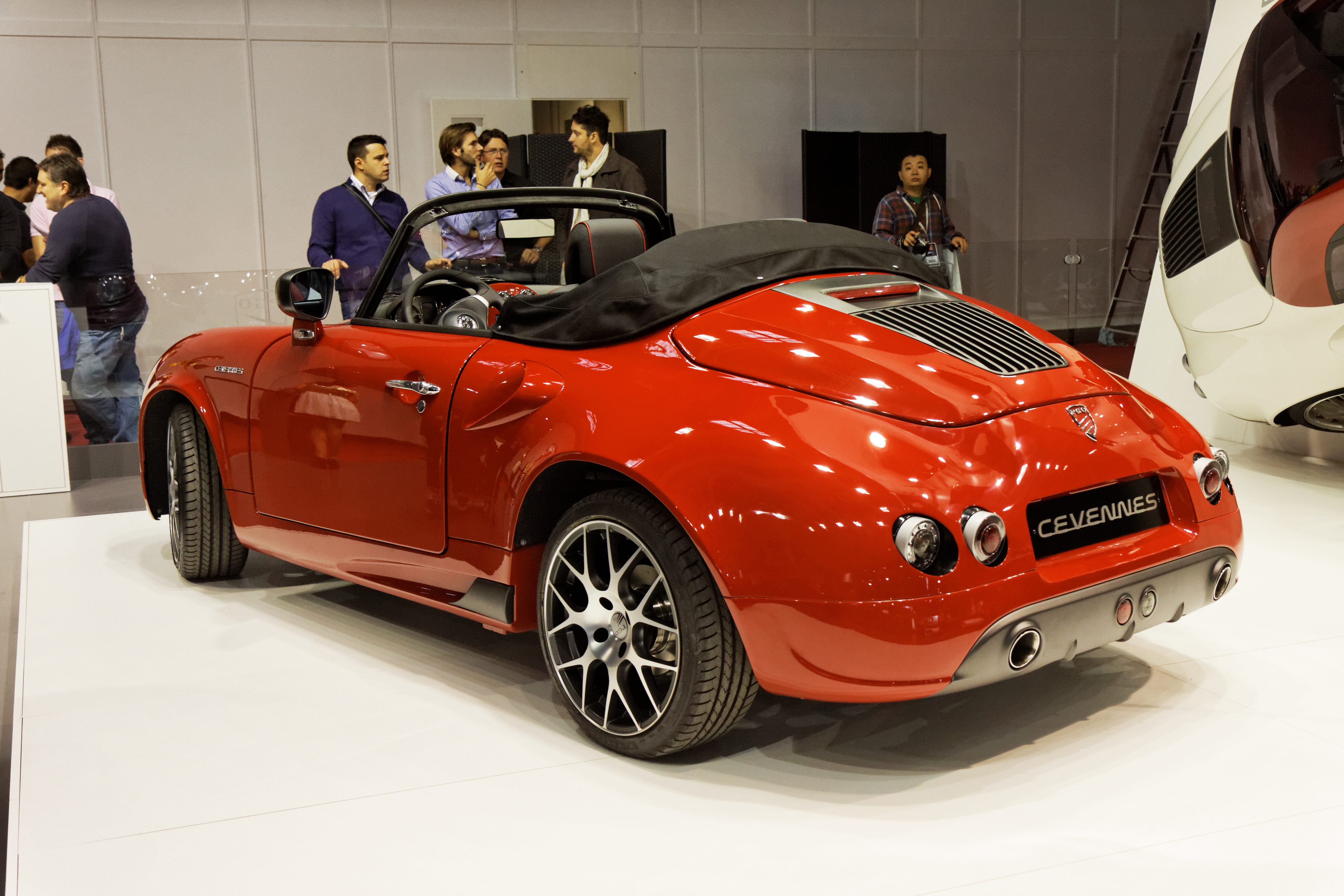 Une PGO Cevennes présentée lors du Mondial de l'Automobile de Paris 2012.